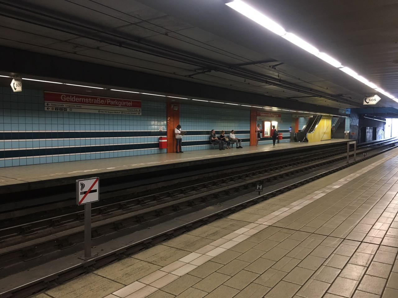 Haltepunkt Köln Geldernstr./Parkgürtel